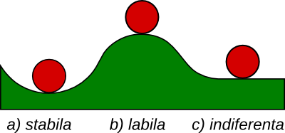 Ekvilibroj